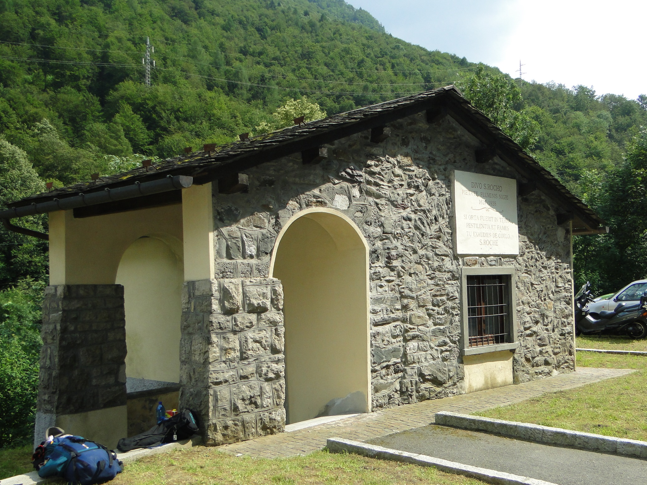 Fiumenero, fraz. di Valbondione (BG). Oratorio di san Rocco